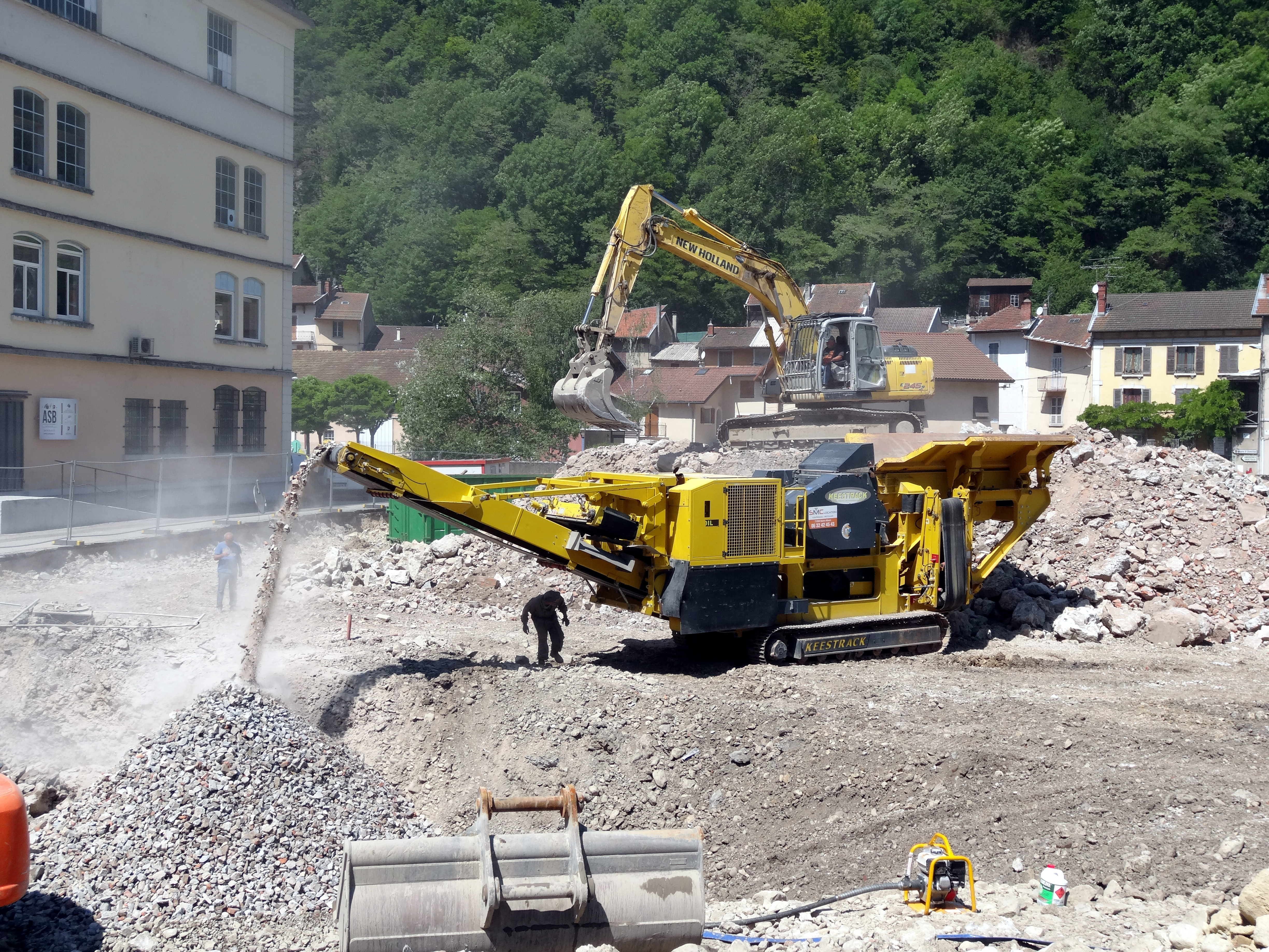 Concasseur Keestrack en action